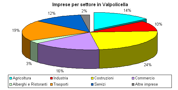 Il grafico evidenzia la distribuzione per settore delle aziende della Valpolicella. I dati sono relativi al 2008 e provengono dalla Camera di Commercio di Verona